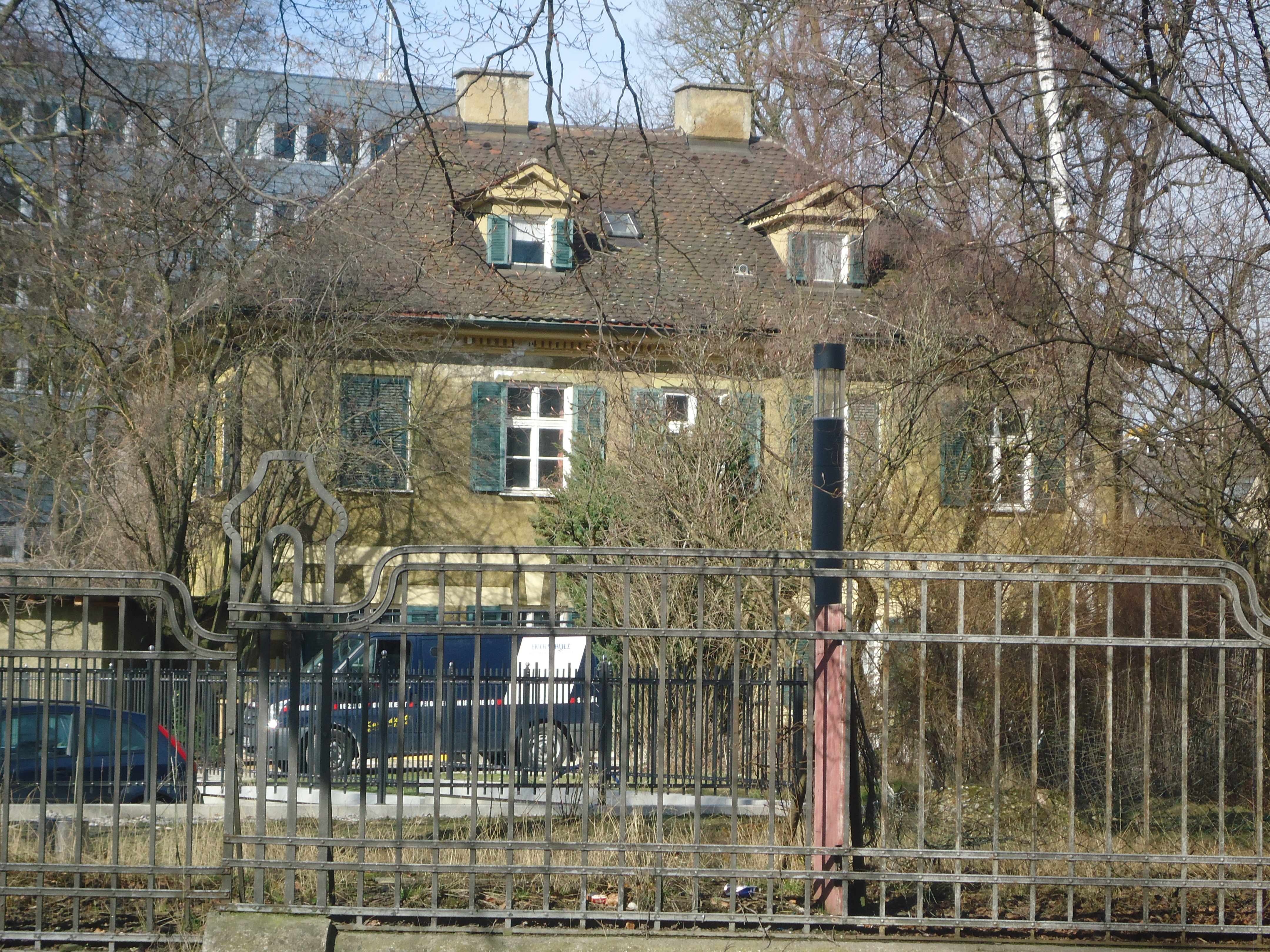 Frölichstraße 20 a Augsburg